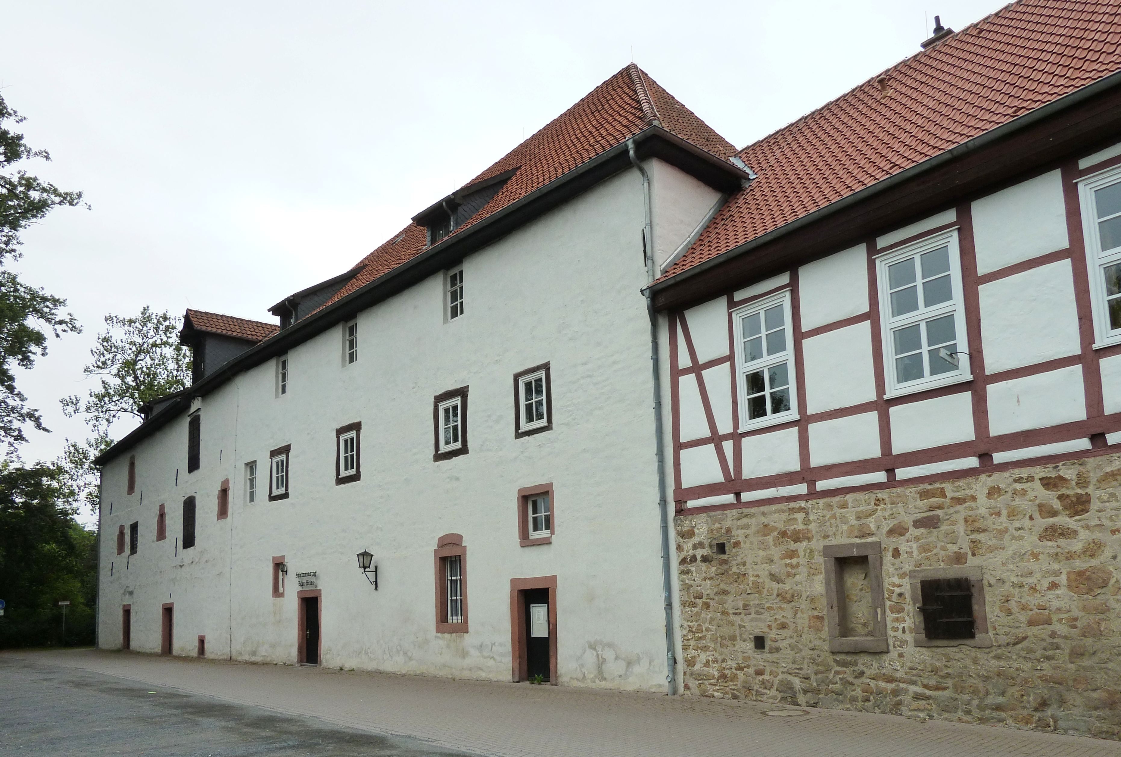 Letzter Rest der ehemaligen Burg in Moringen, Landkreis Northeim, Südniedersachsen. Ansicht von Nordosten. Früher Brau-, Back-, Korn- und Gesindehaus, im Norden (= rechts) Gefängnisanbau, errichtet in der ersten Hälfte des 19. Jahrhunderts unter Verwendung älterer Bausubstanz